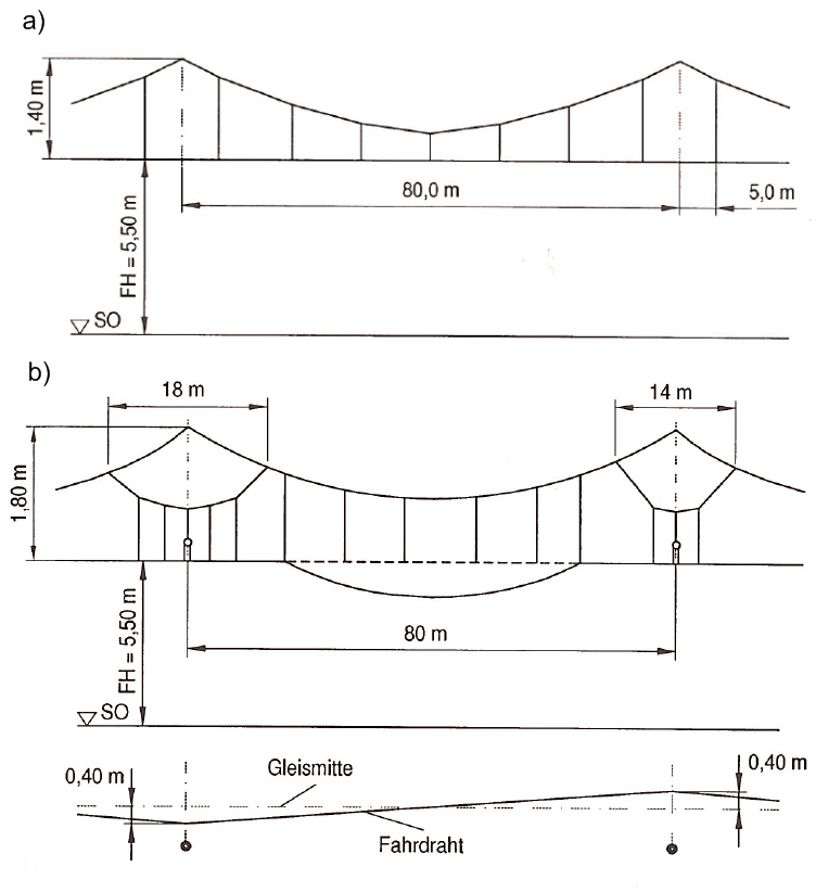 Kettenwerksanordnung a) ohne und b) mit Y-Beiseil